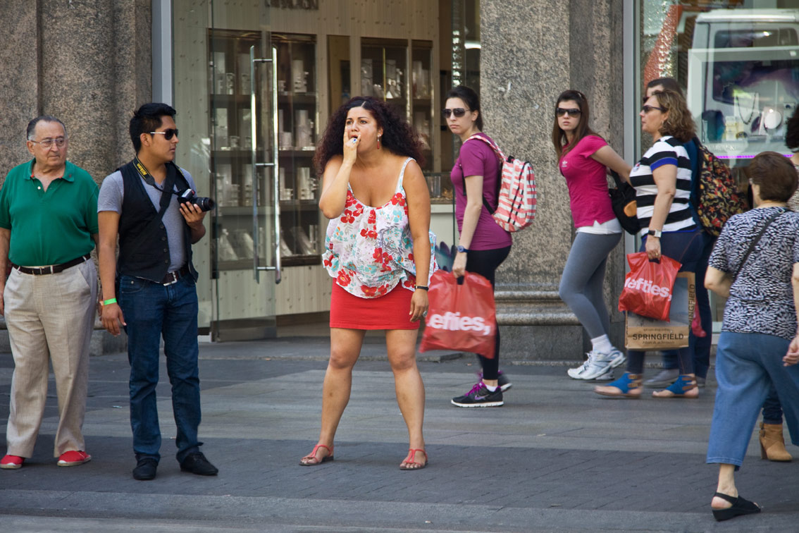 Escena de la acción "Poses"